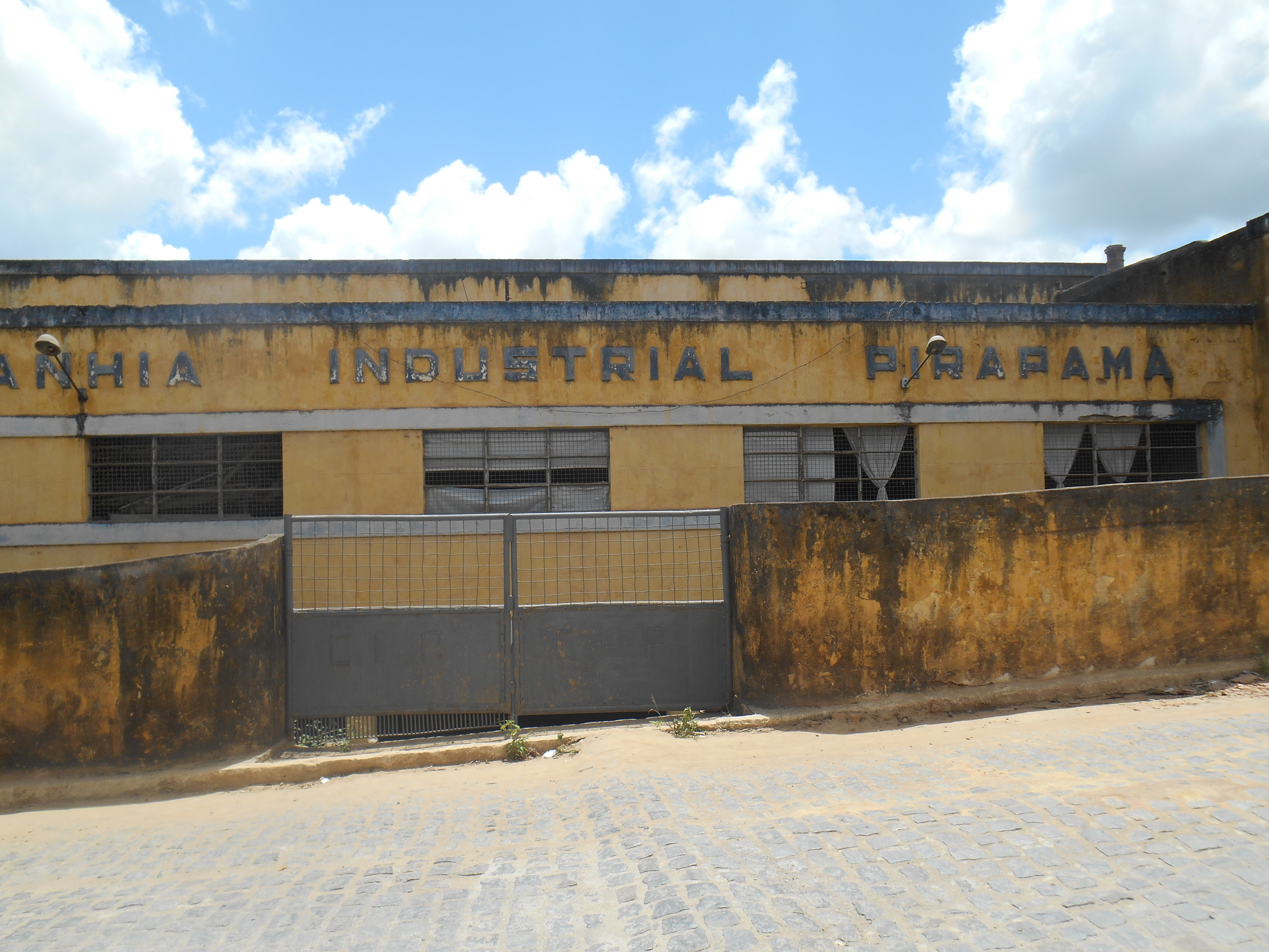 Prédio da Companhia Industrial Pirapama, em Escada, no estado brasileiro de Pernambuco.